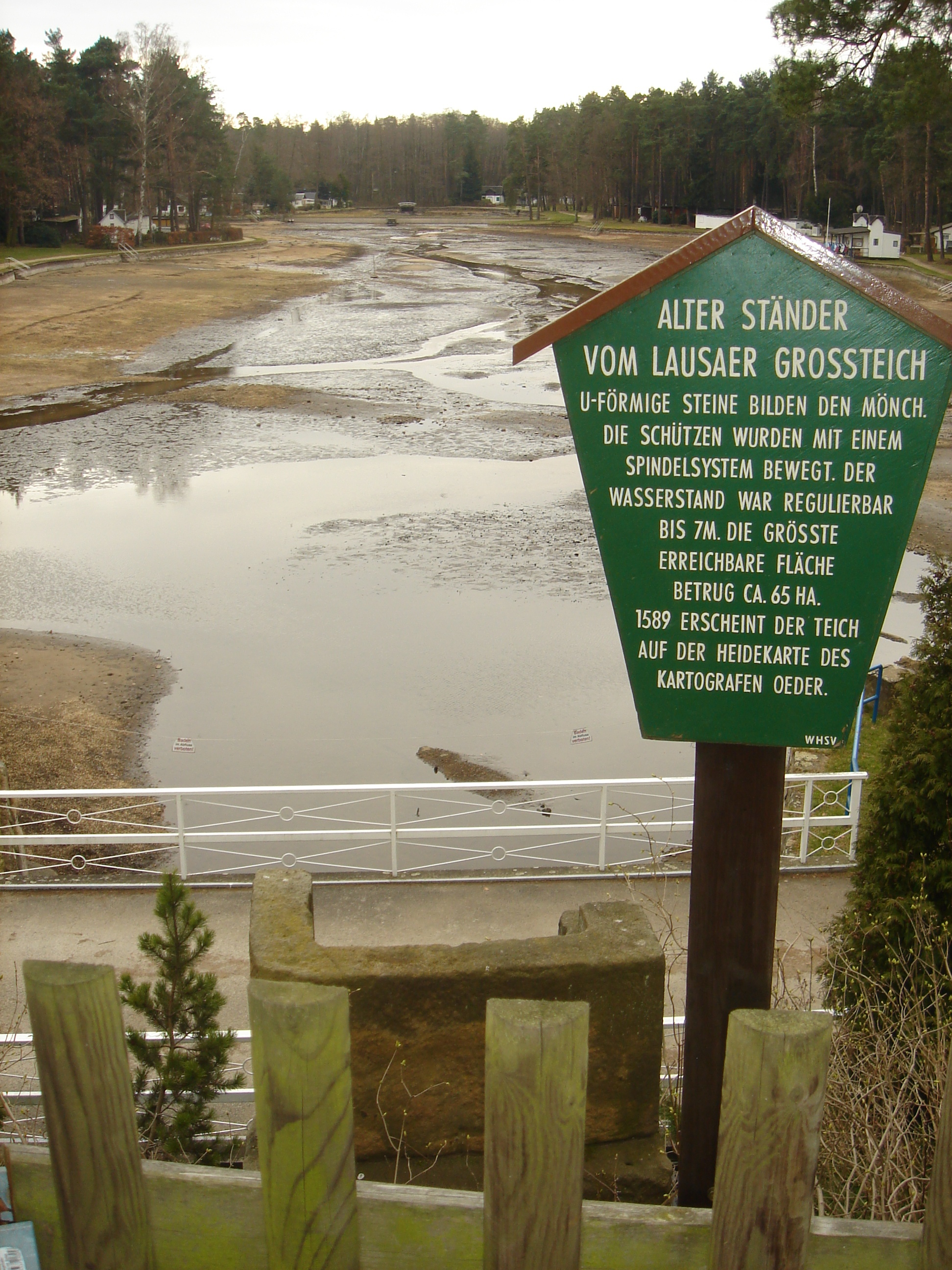 Großteich, Weixdorf, near Dresden